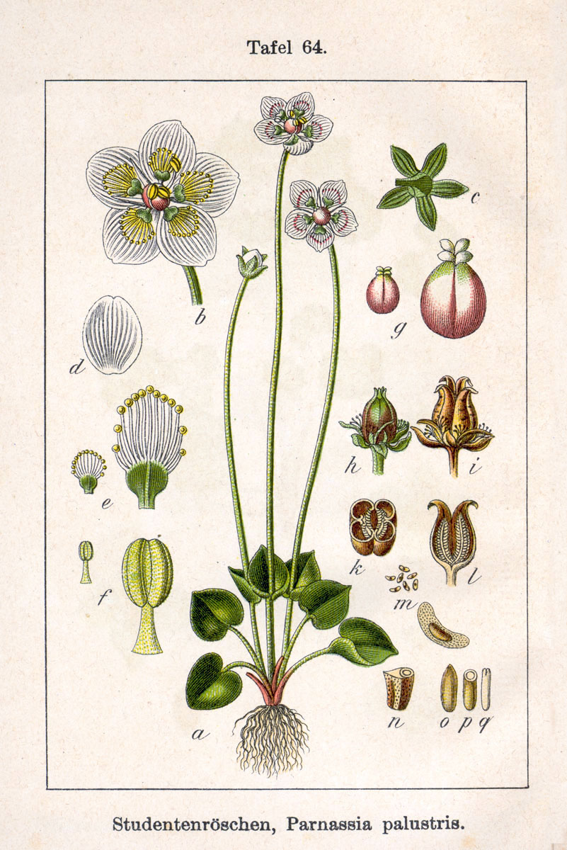 Parnassia palustris L. Original Description Studentenröschen, Parnassia palustris